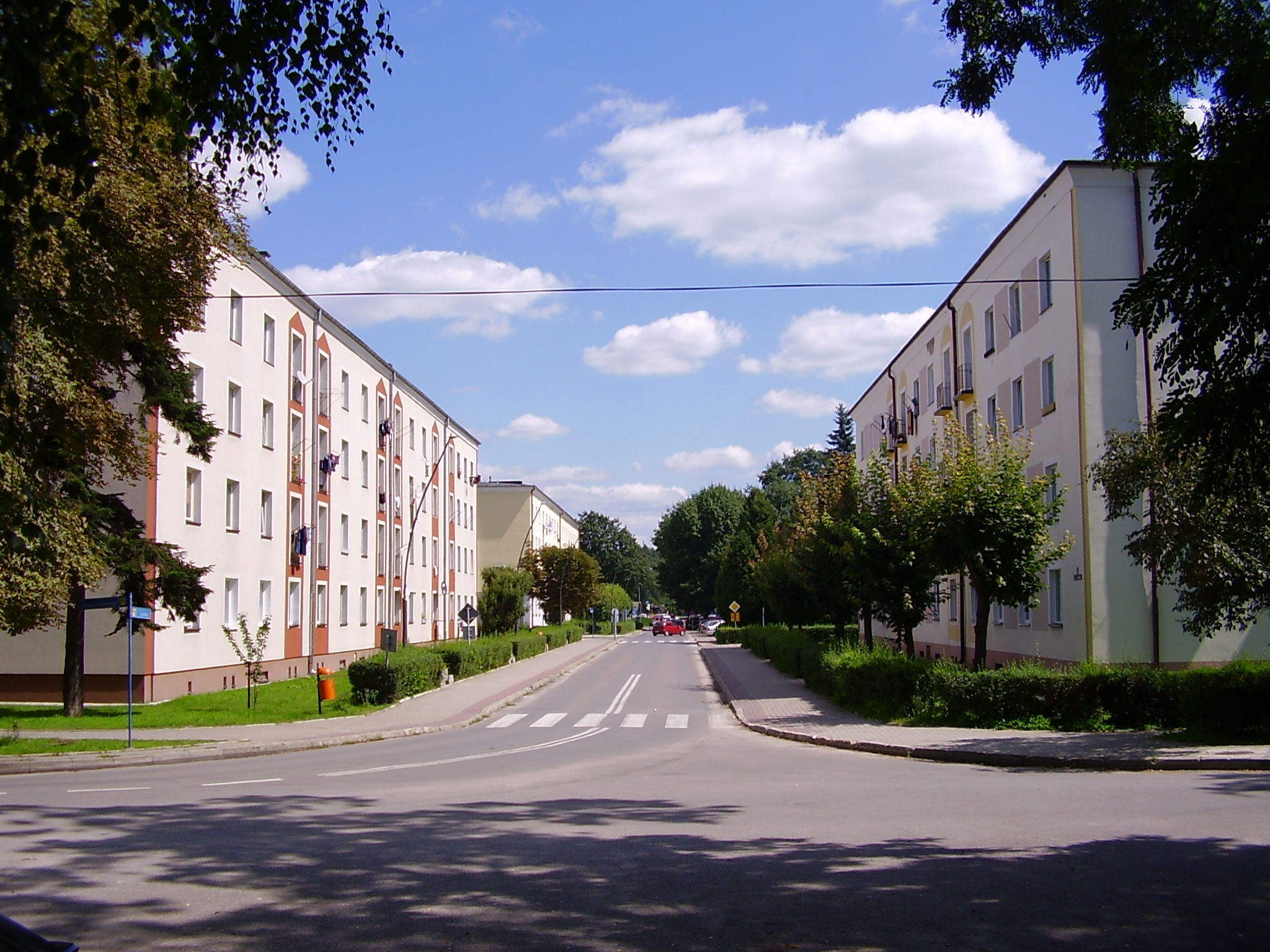 Nowa Dęba, ul. 1 Maja, 2011-08-05